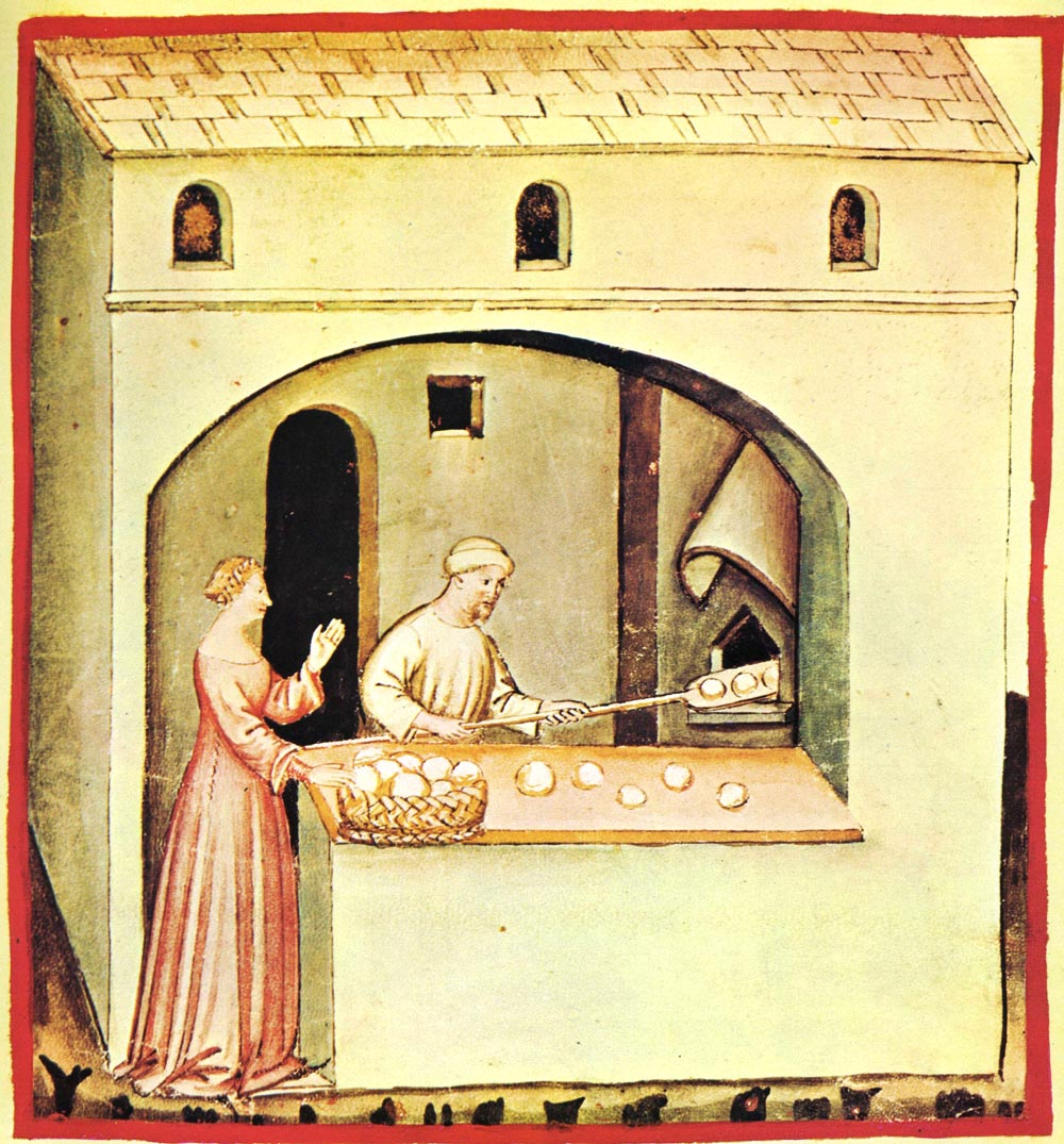 Tacuina sanitatis (XIV century) -alimenti,pane,Taccuino Sanitatis, Casanatense 4182.